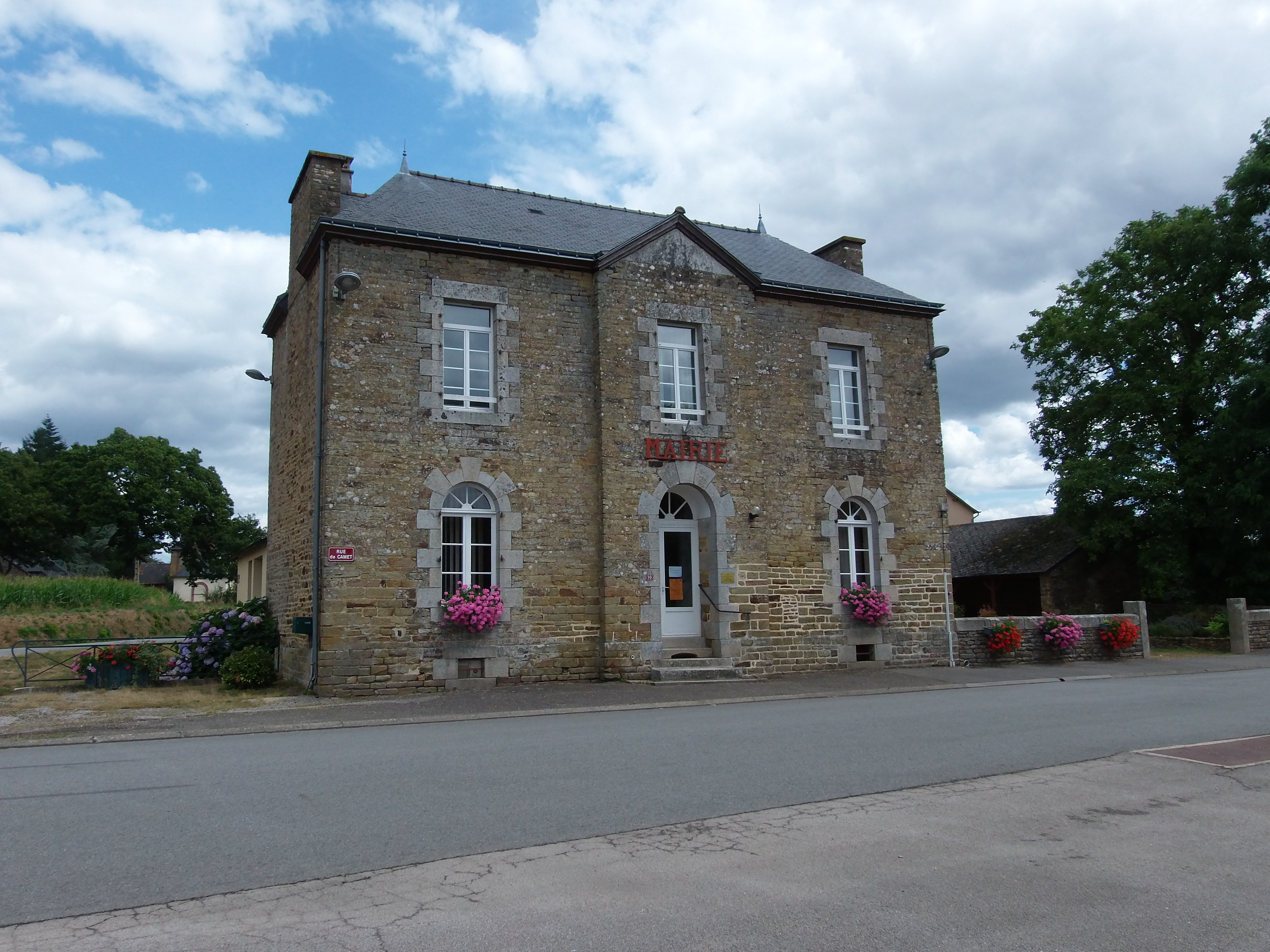 Vue de la façade de la mairie de Saint-Brieuc de Mauron.